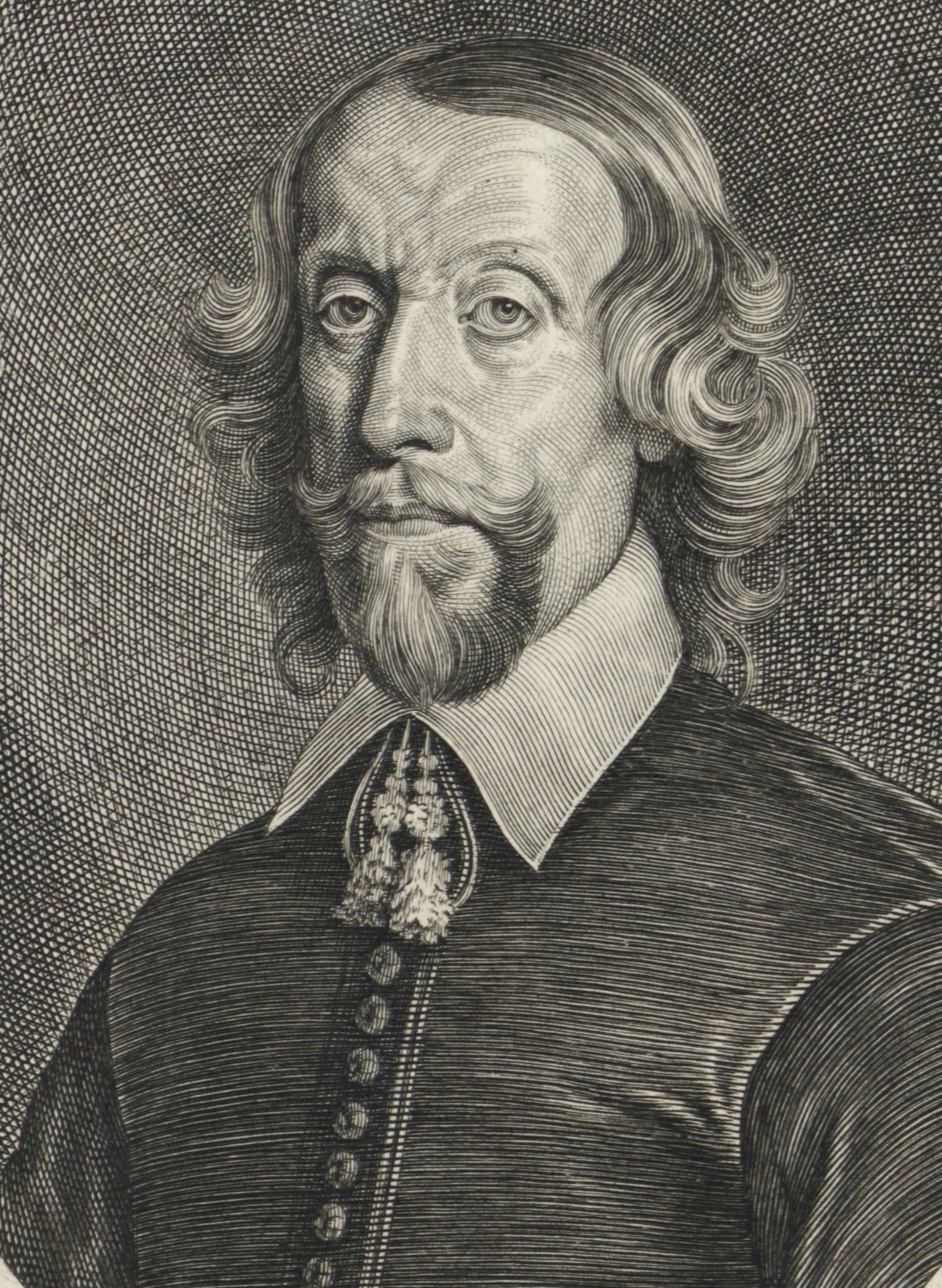 Broderus Pauli. D. I.U. [DIV], 1598-1680; Jurist; Syndikus und Bürgermeister in Hamburg; 1643 Gesandter beim Reichstag in Regensburg Reipublicae Hamburgensis Syndicus, et ad Comitia, Ratisbonae Anno Chr[ist]i. M.DC.LIV. Celebrata, Delegatus